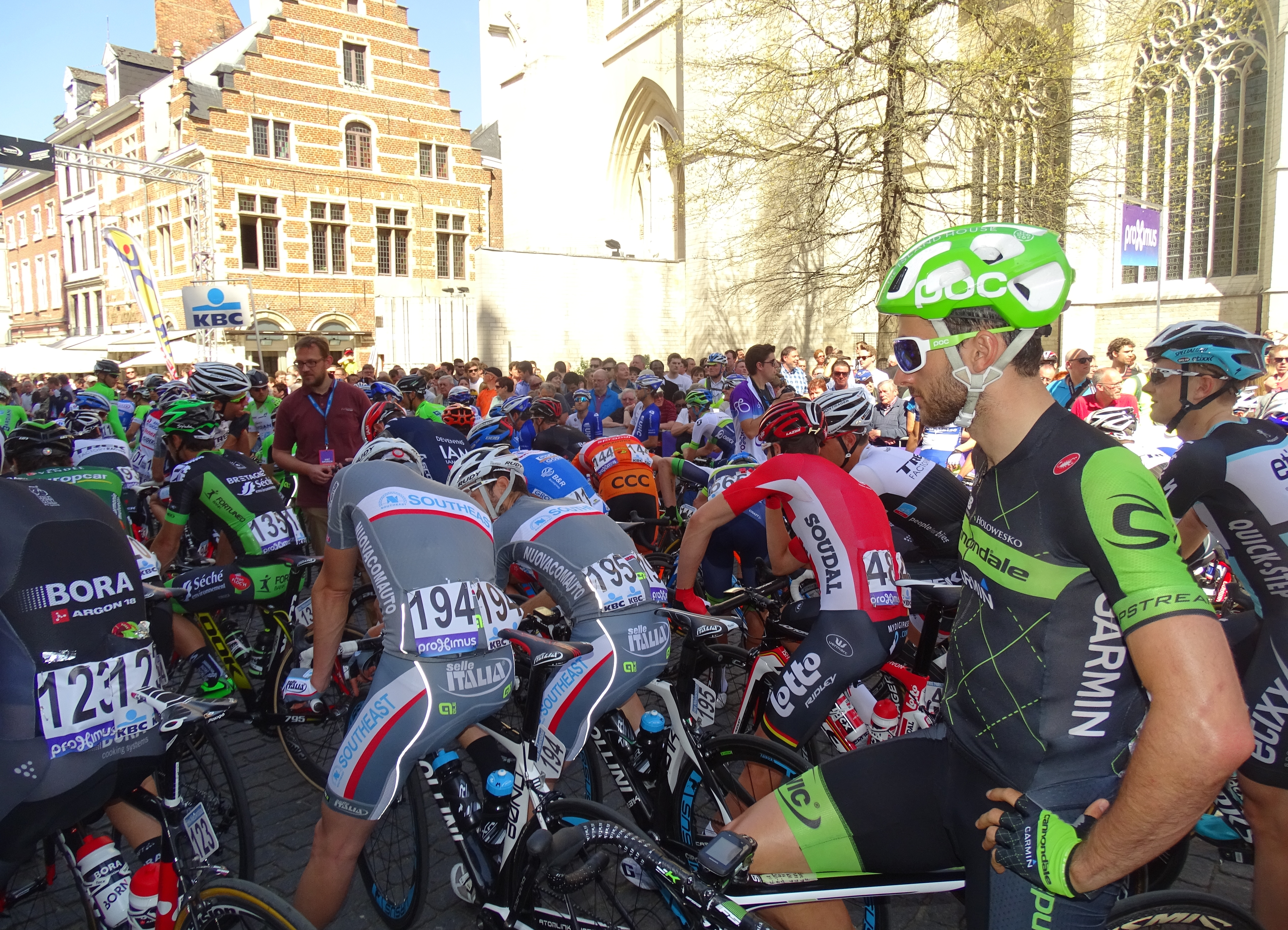 Reportage réalisé le mercredi 15 avril à l'occasion du départ de la Flèche brabançonne 2015 à Louvain, Belgique.